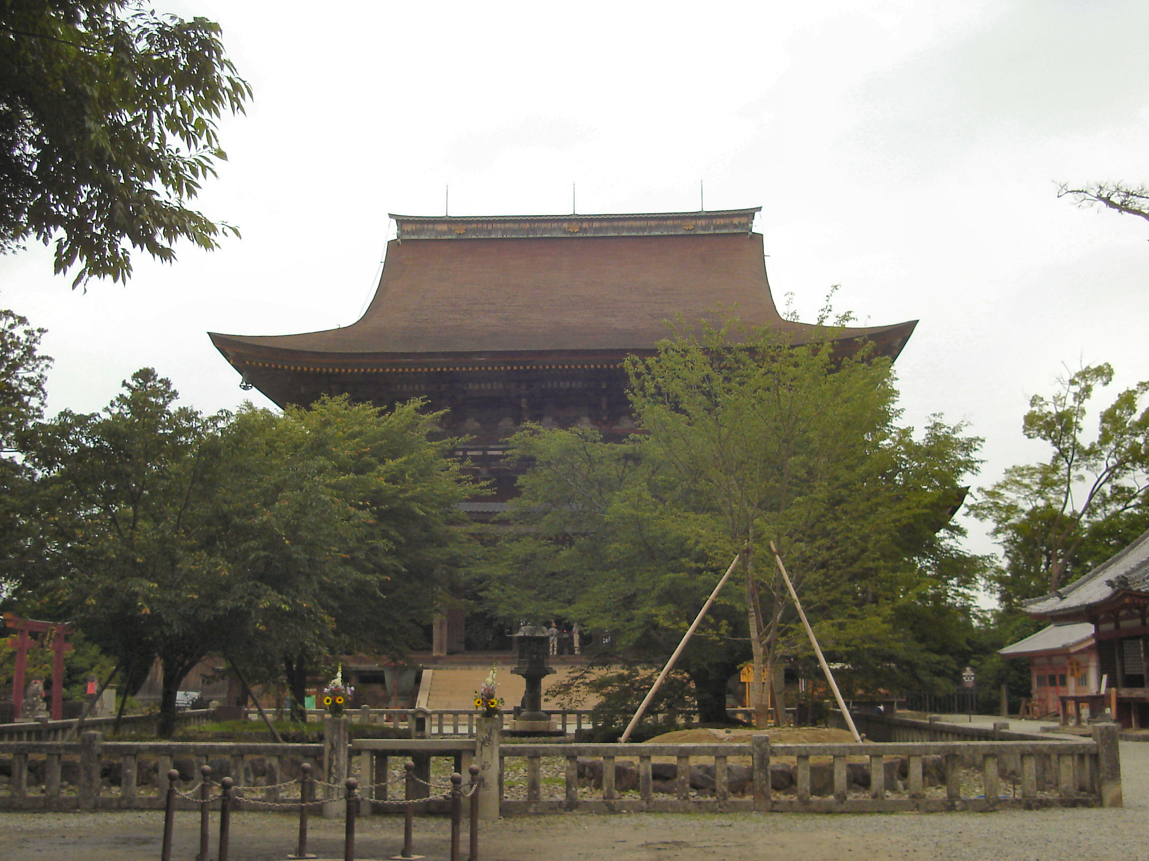 Kinpusenji Zaodo (金峯山寺 蔵王堂) Nara , Japan